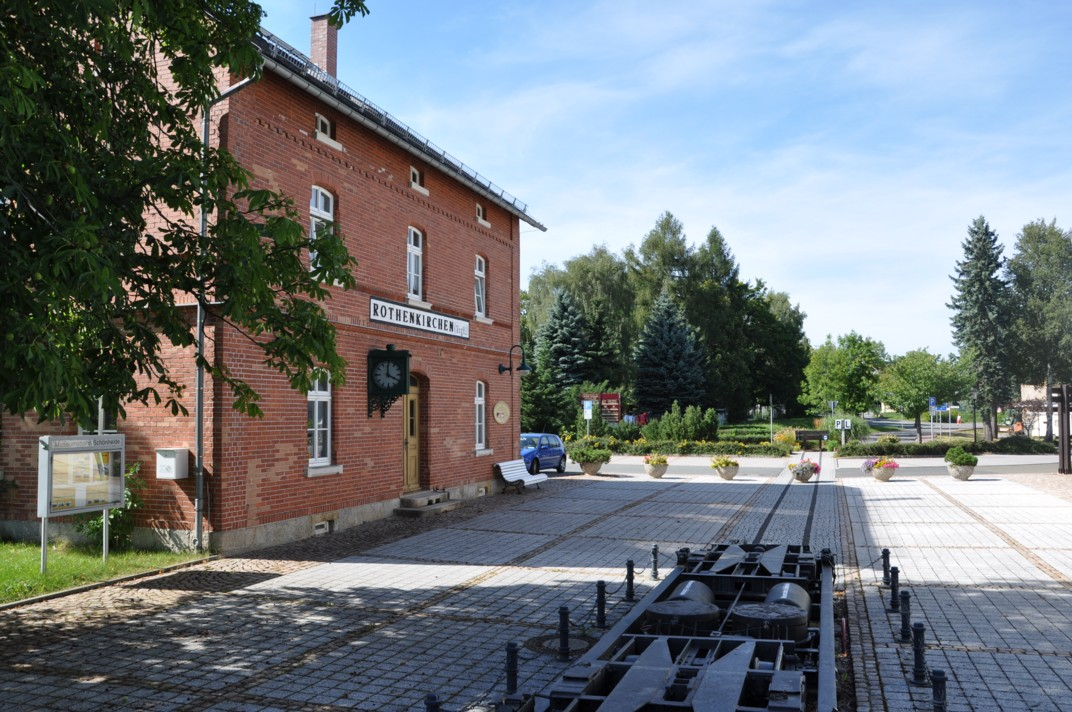 Bahnhof Rothenkirchen (Vogtl)